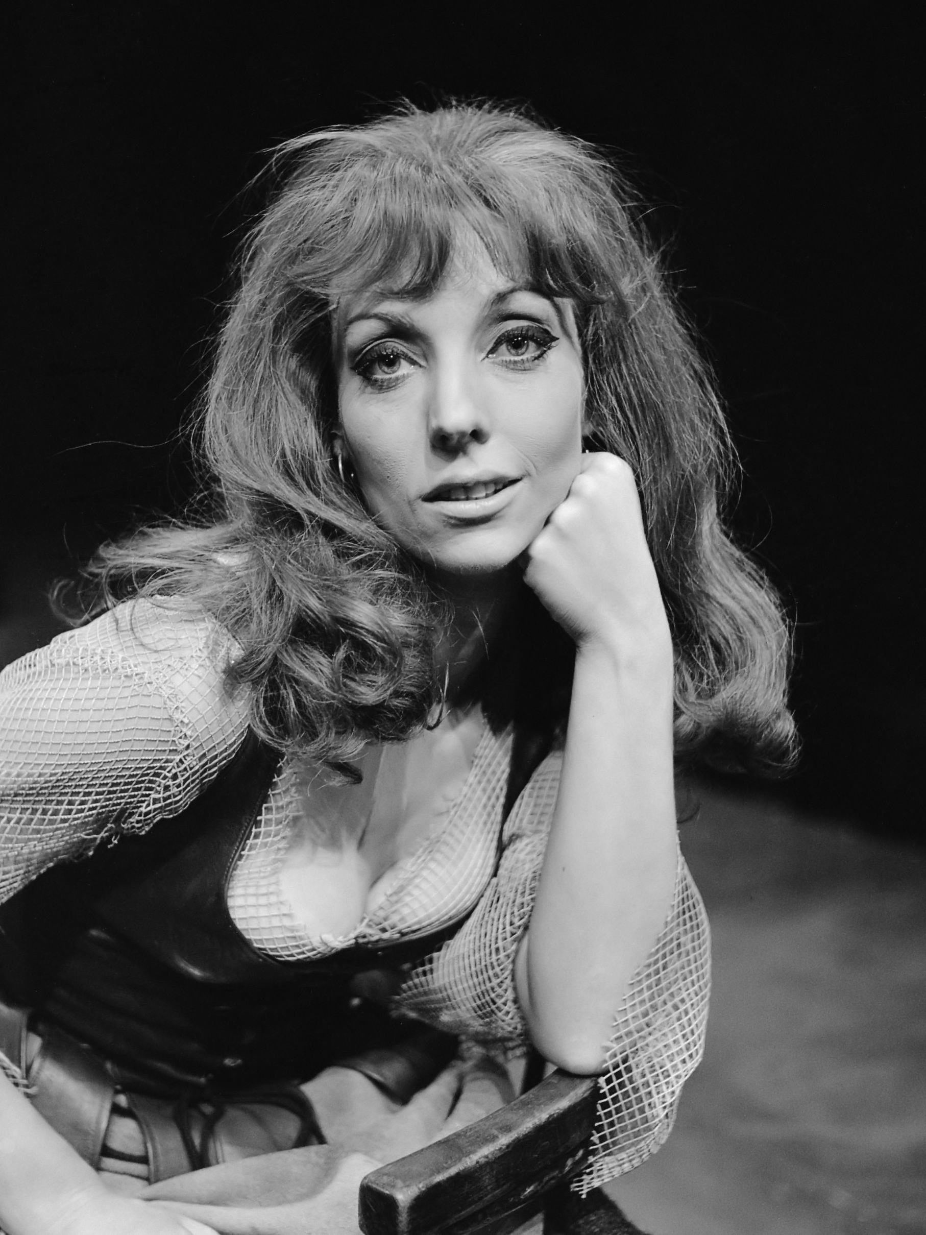 Repetitie in costuum "De Man van La Mancha " Carry Tefsen 19 december 1968